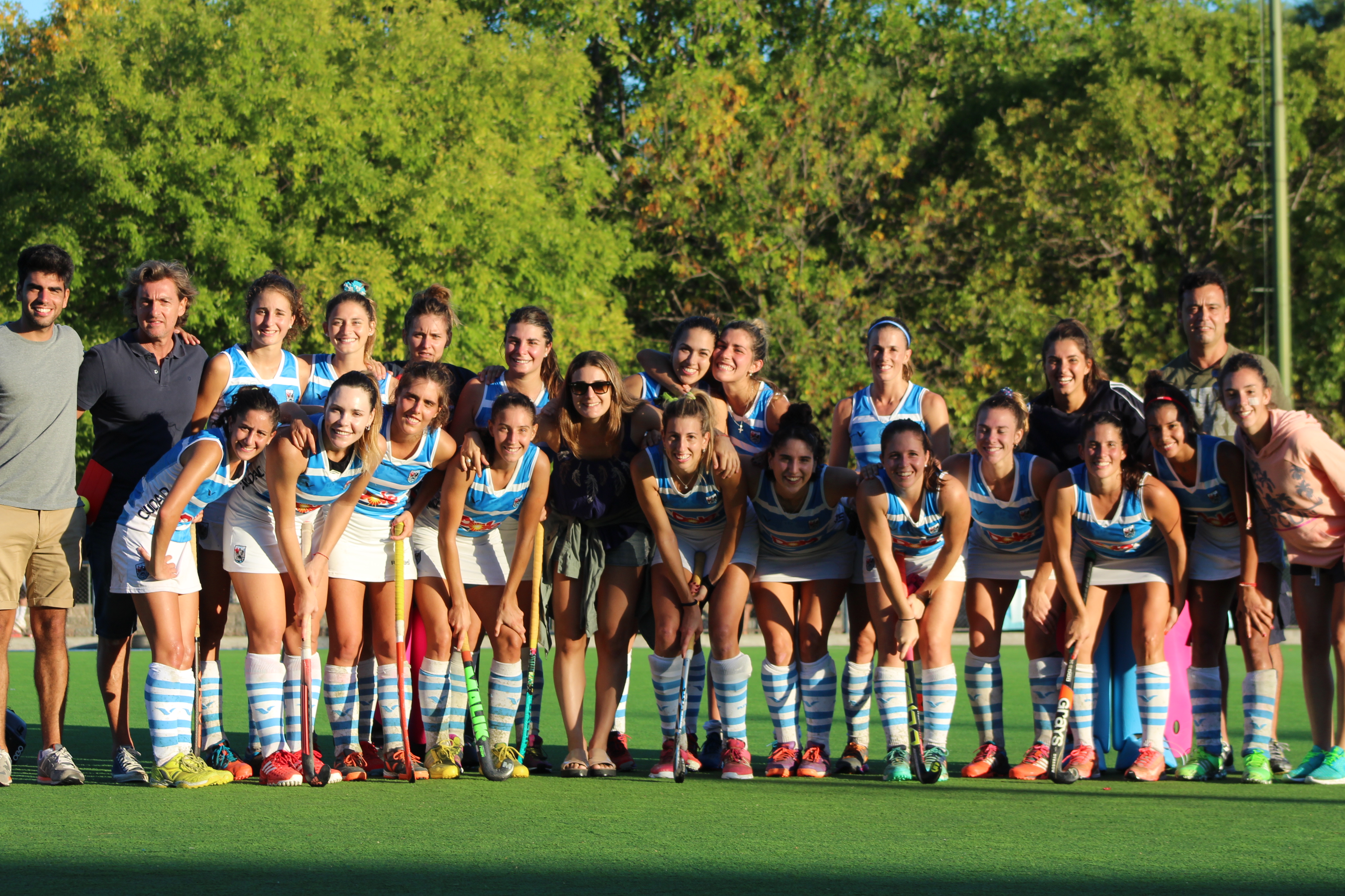 Ciudad A 2017